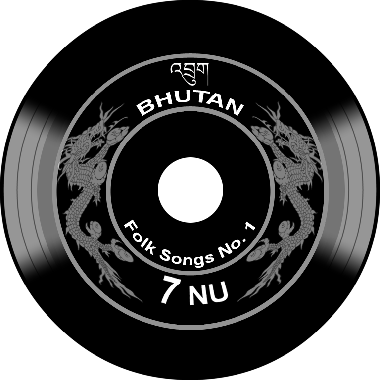 Replica de un sello disco de Bután